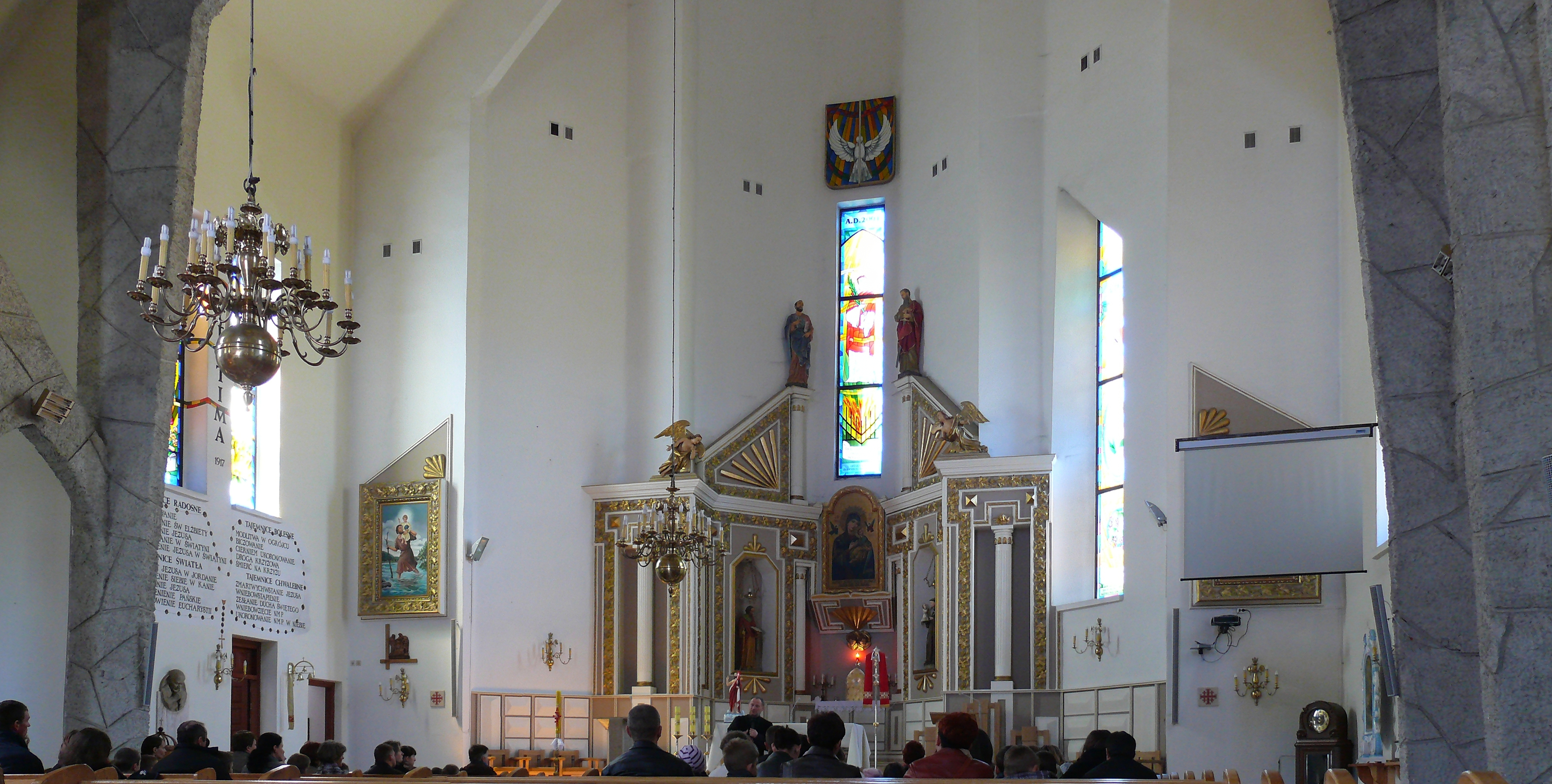 Panorama ołtarza głównego w kościele parafialnym p.w. Św. Wawrzyńca w Rogóźnie, gmina Ludwin, województwo lubelskie.